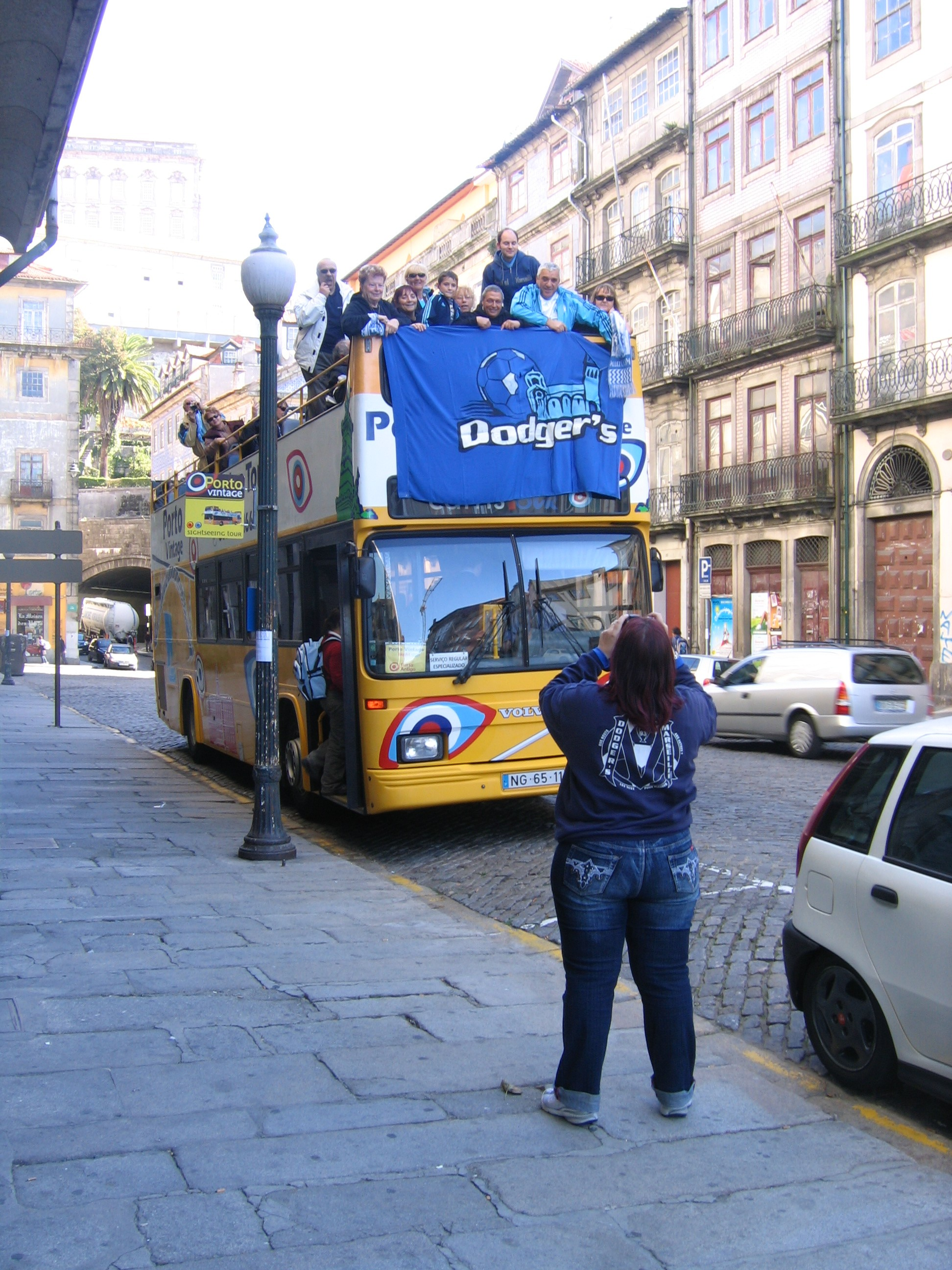 Les supporters marseillais à Porto - Les supporters de l'Olympique de Marseille avant le match du soir au stade du dragon.